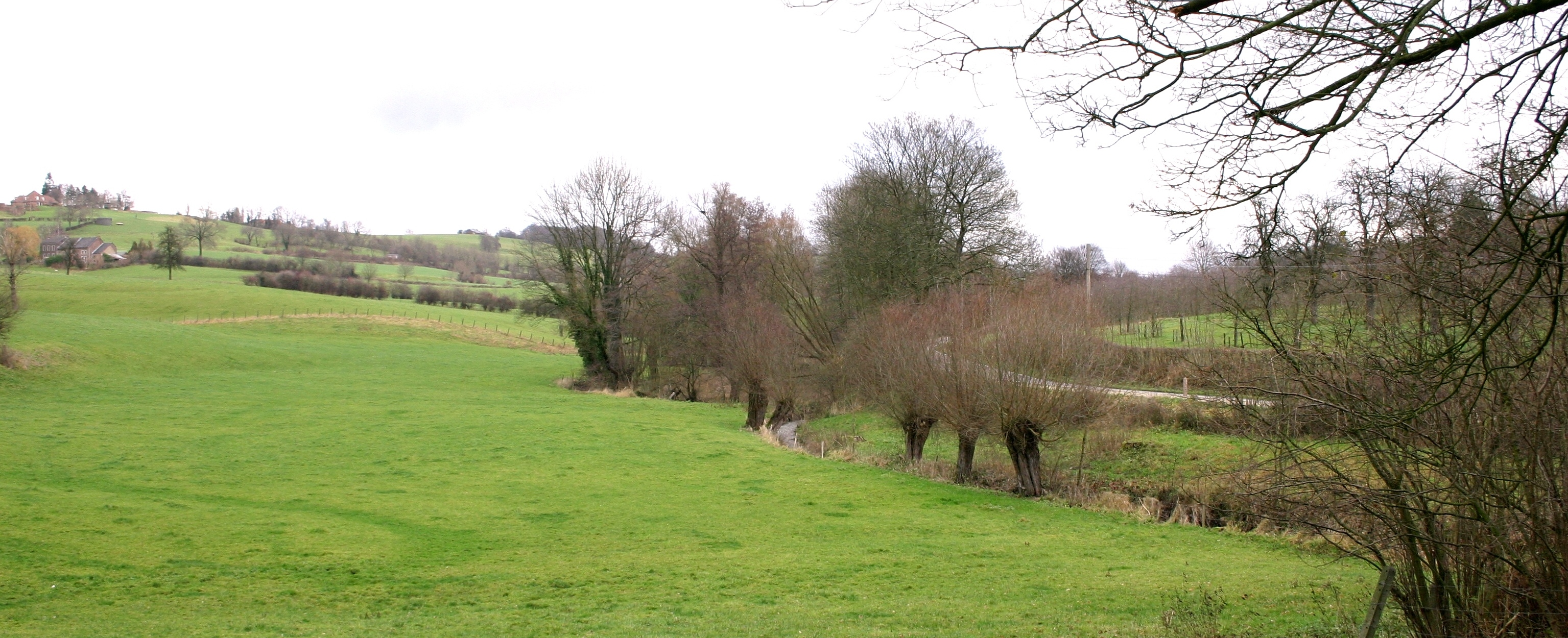 D'Bel bei Saint-Jean-Sart.